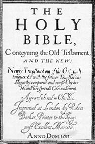 bijbeluitgave 1611